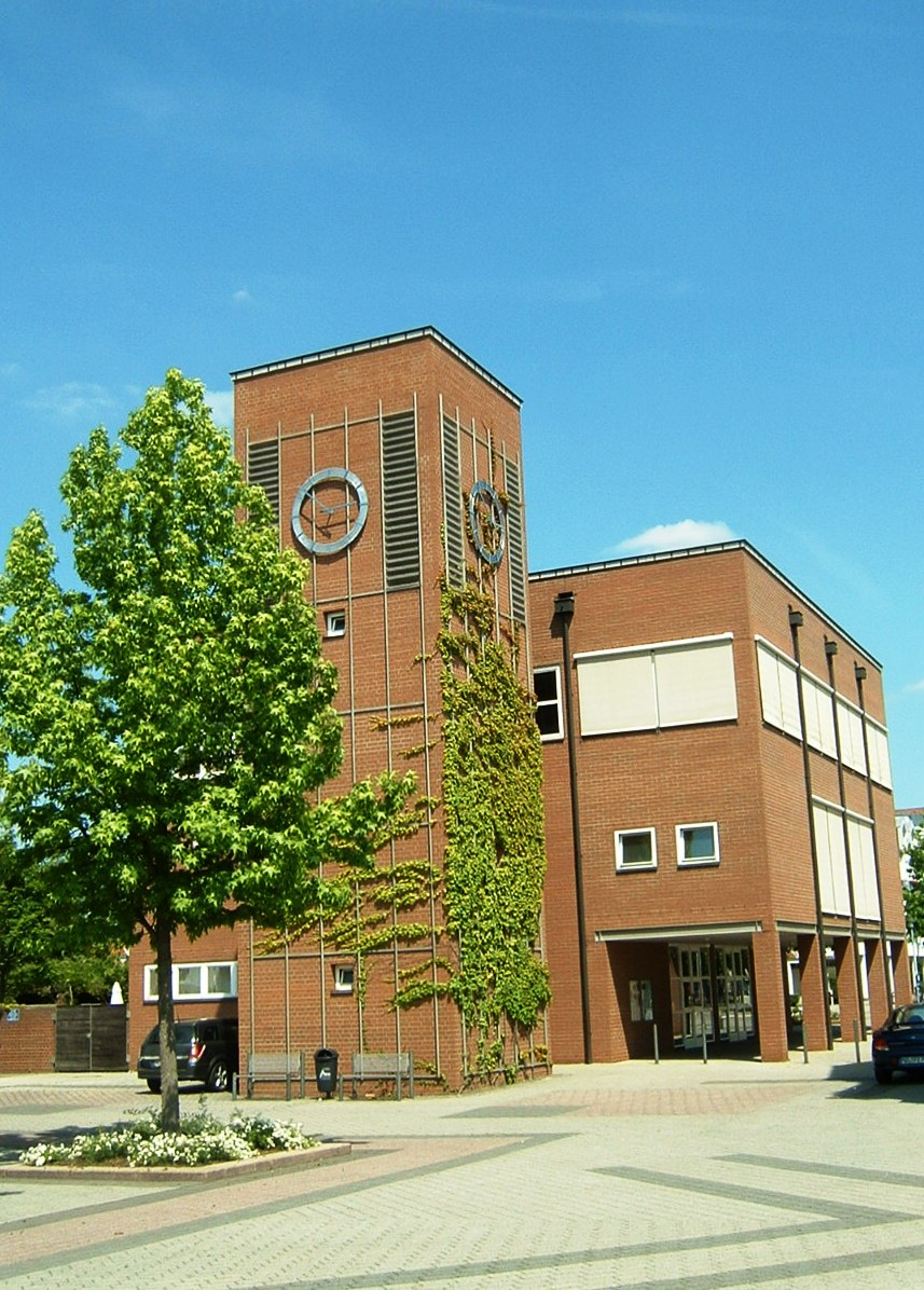 evangelische Jacobskirche in Nilkheim